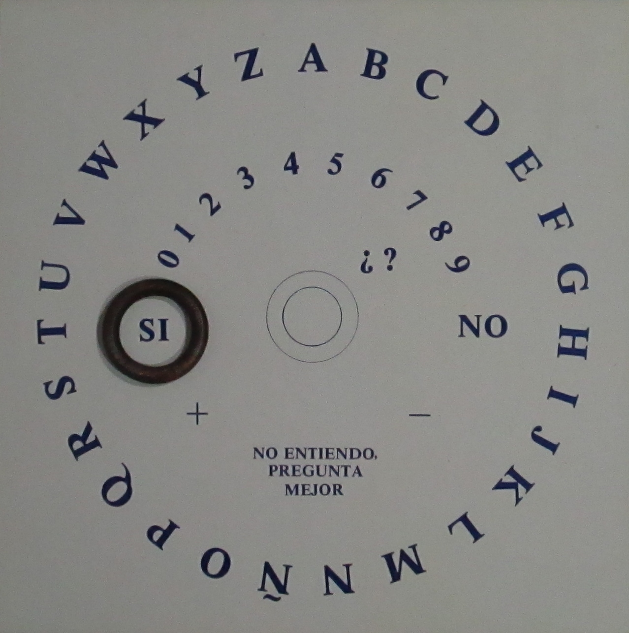 Tablero Oui-Ja.